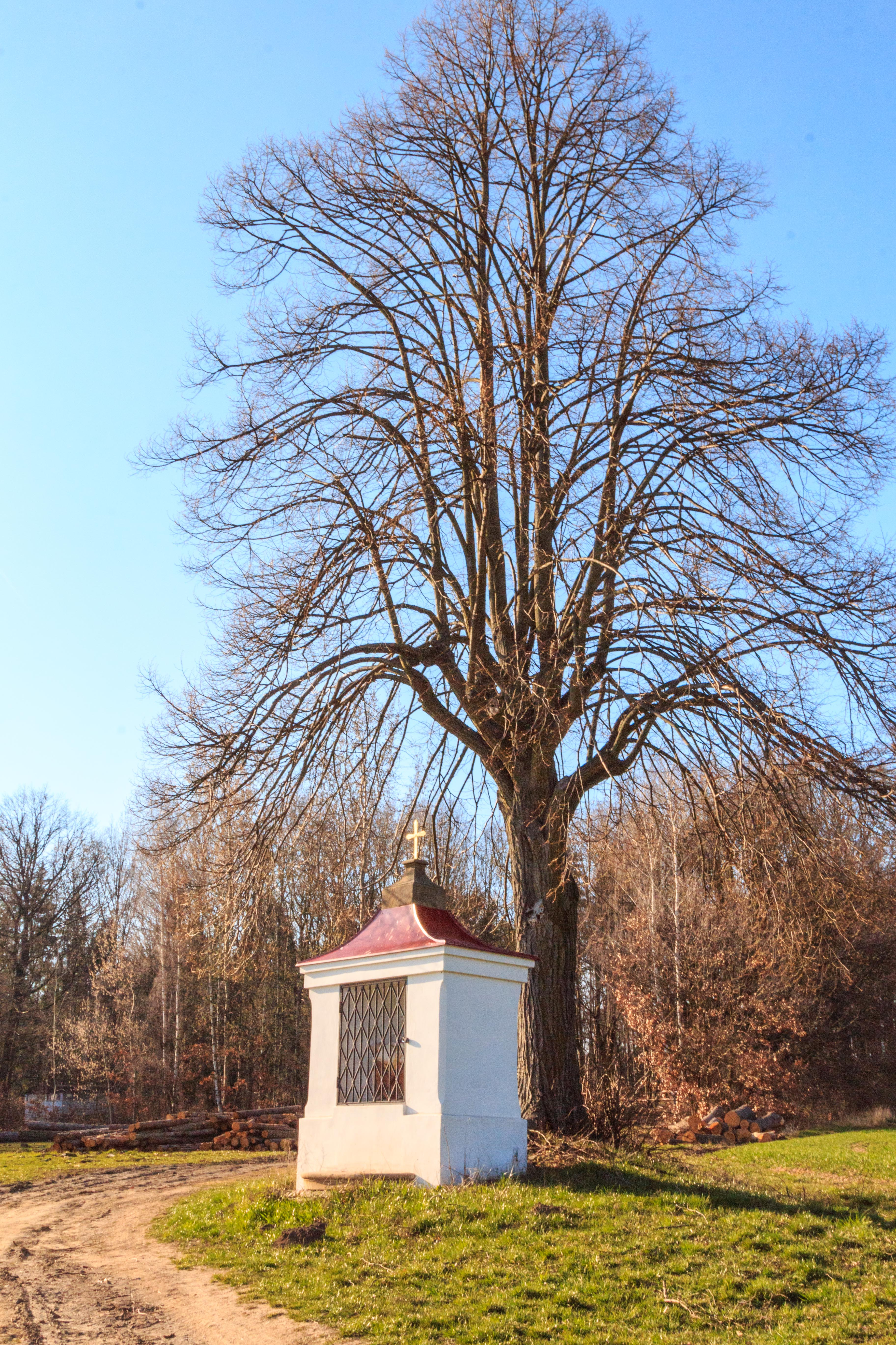 Výklenková kaple u Bukvice